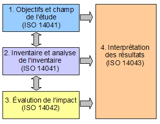 Relations entre les différentes étapes du processus d'analyse du cycle de vie. Auteur : Stéphane Guidoin, inspiré de ISO 14040